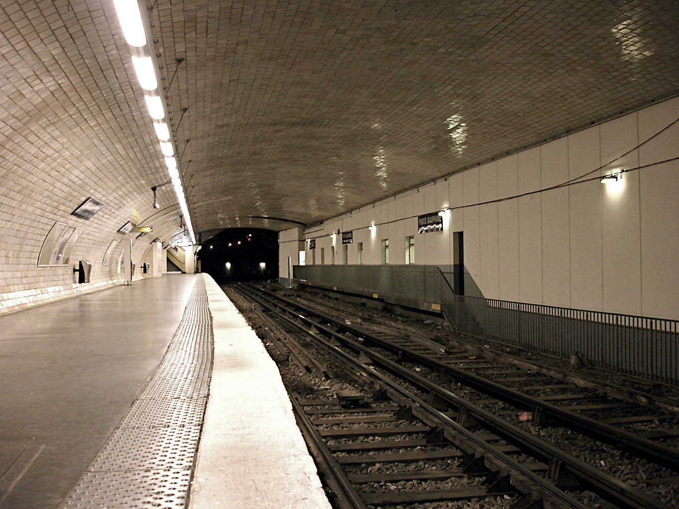 Station Porte Dauphine de la ligne 2 du métro de Paris, France.